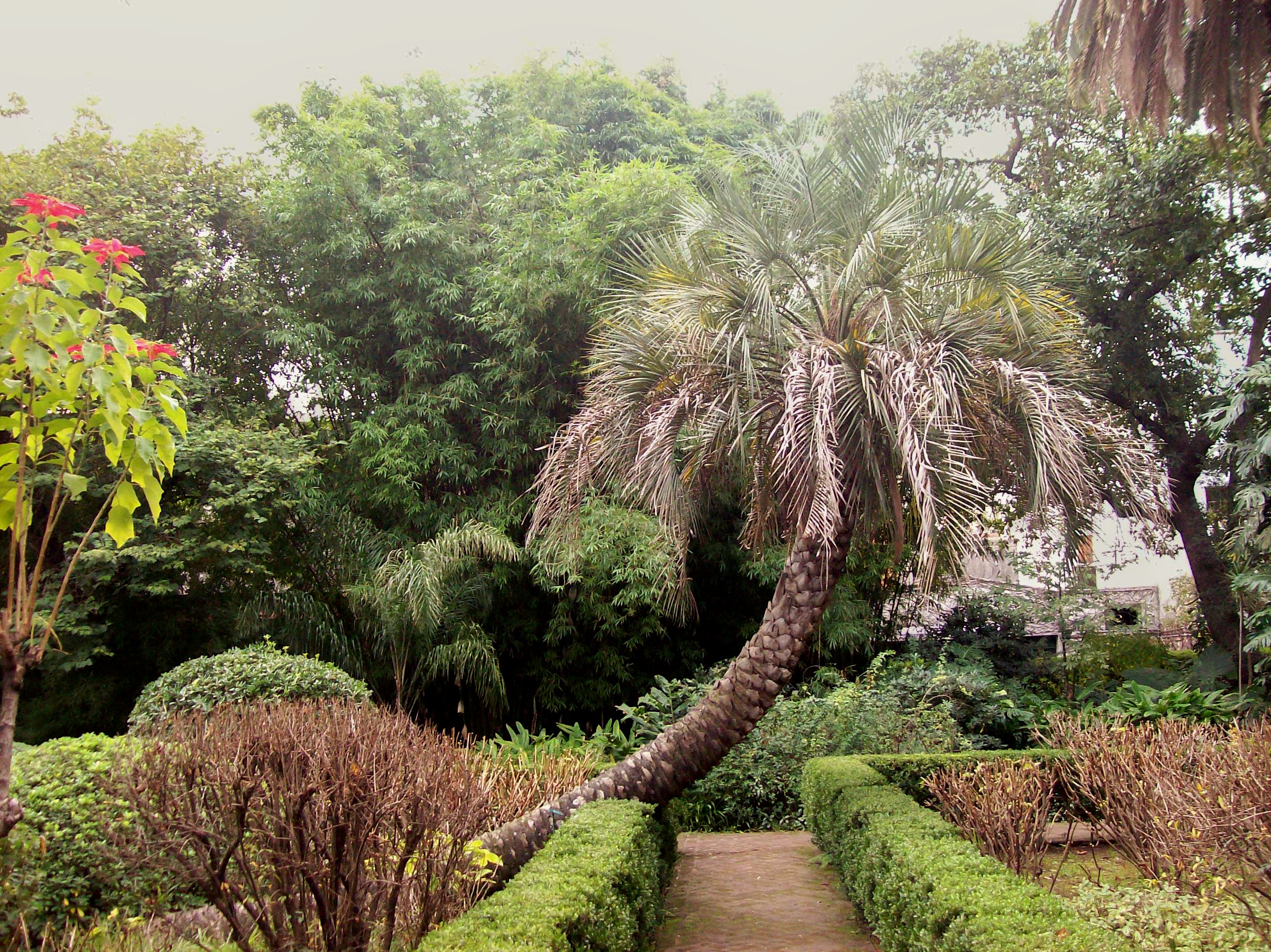 Museo de Arte Español Enrique Larreta, en Avenida Juramento, barrio de Belgrano, Buenos Aires, Argentina: palmera Yatay (Butia Eryospata)